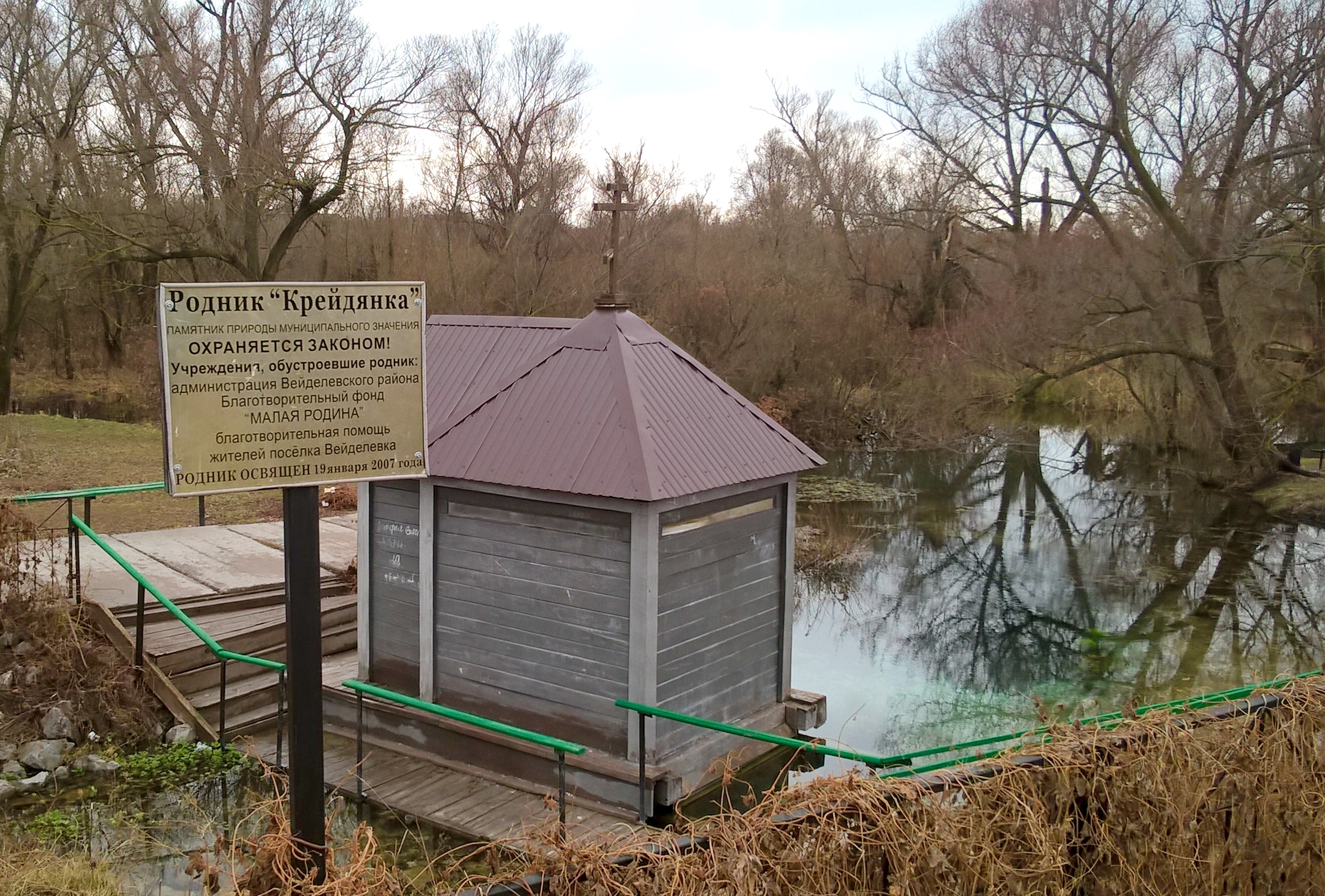 Родник 'Крейдянка': Пос. Вейделевка, между улицами Колхозная и Пролетарская, Вейделевка, Вейделевский район, Белгородская область This image is related to the protected area of Russia number 3110132